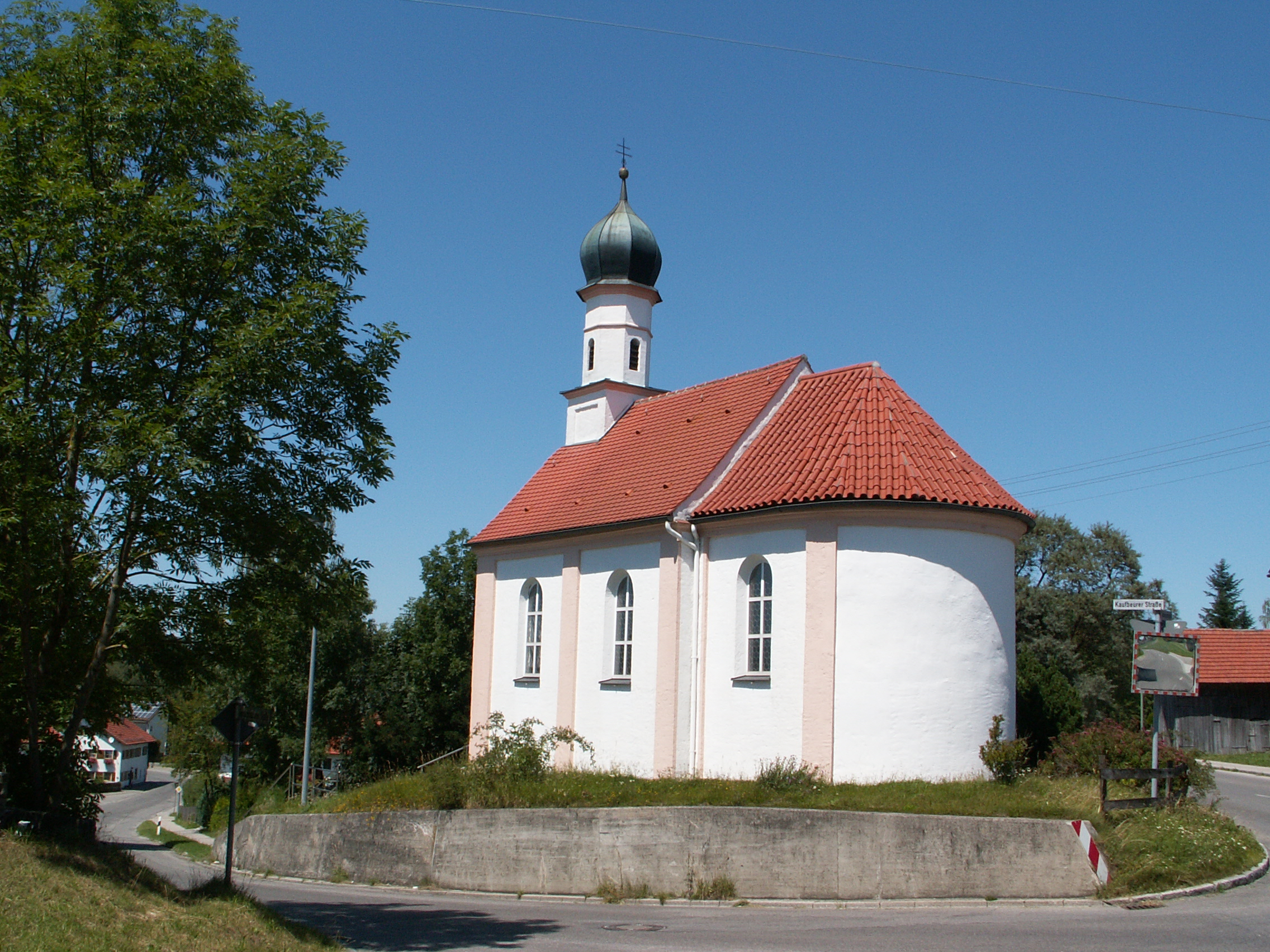 Kapelle in Thalhofen a. d. Gennach, Stöttwang